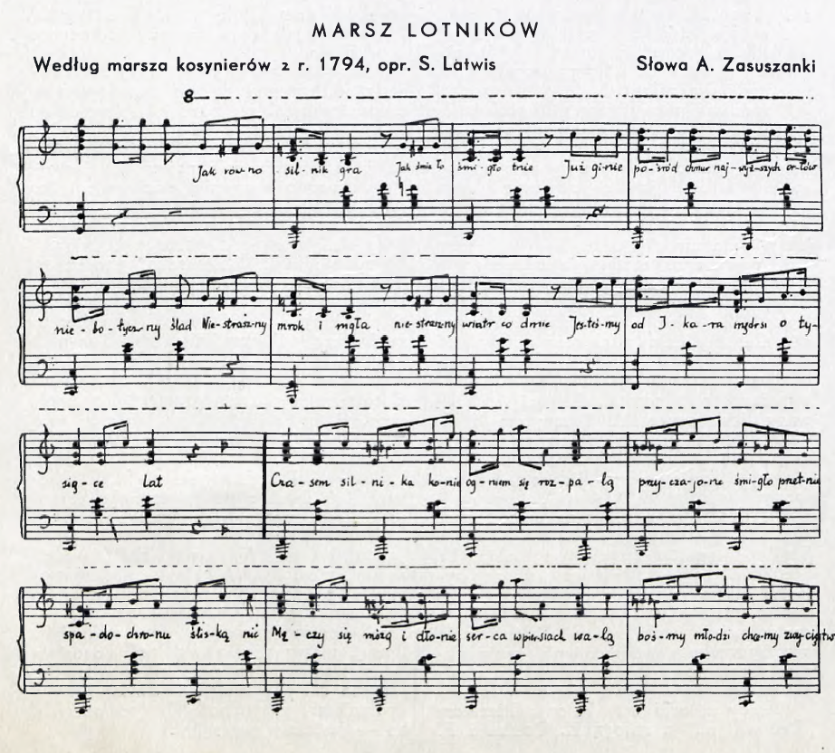 Zapis nutowy Marsza Lotników z 1934 r.